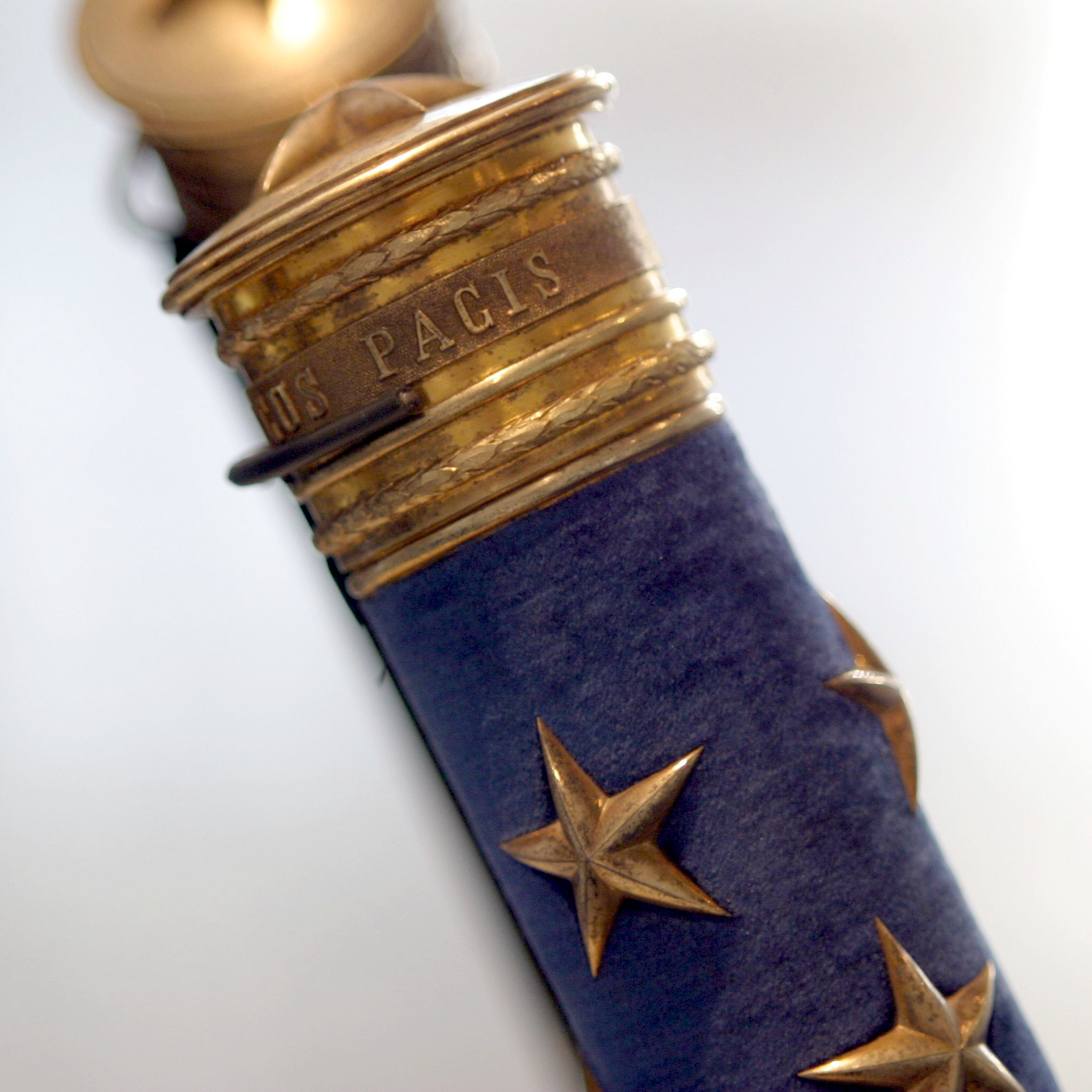 Baton of a modern Marshal of France. This image was taken at the Musée de l'Armée, Paris.